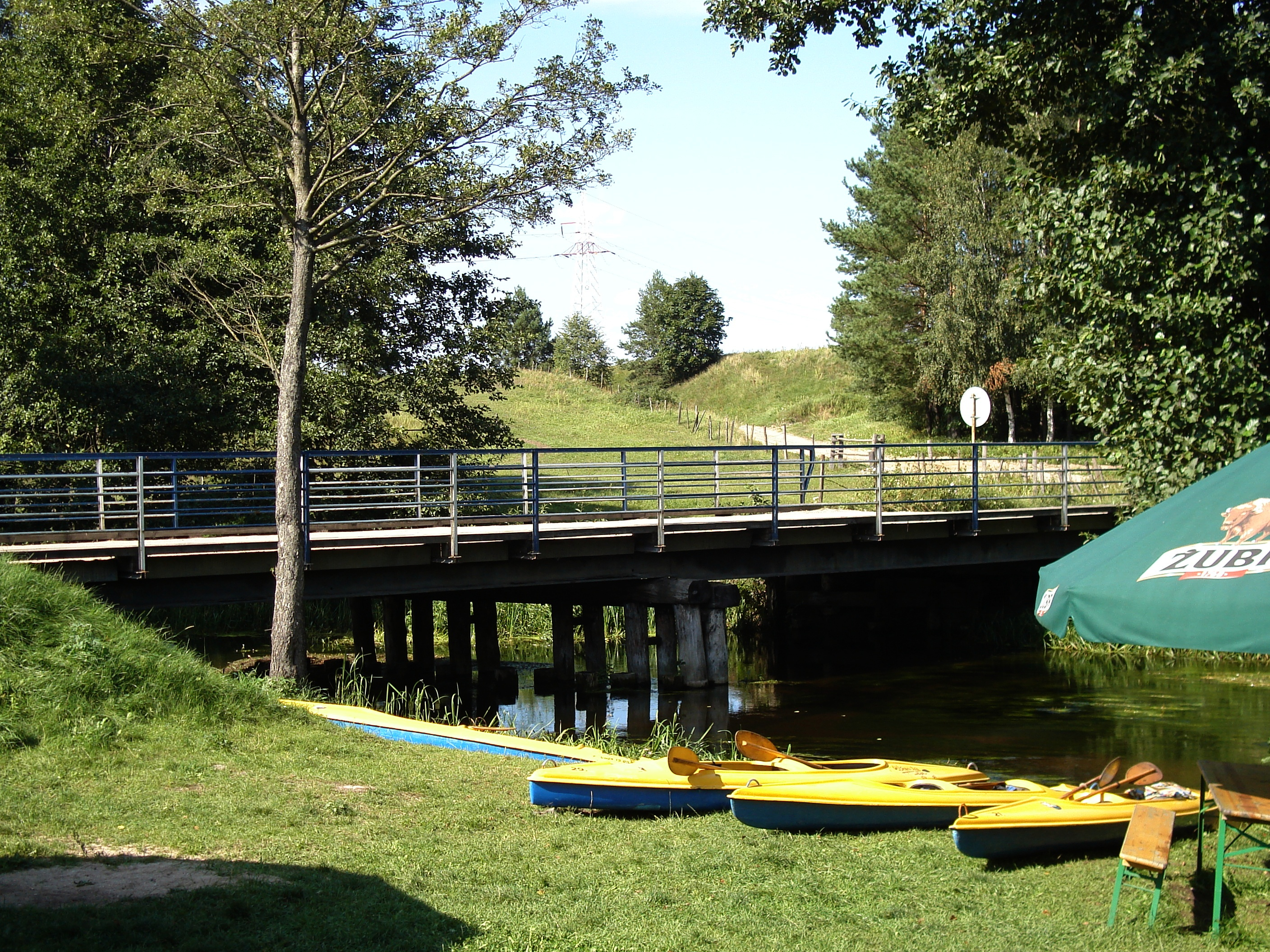 Most na Rospudzie, w okolicach Dowspudy.